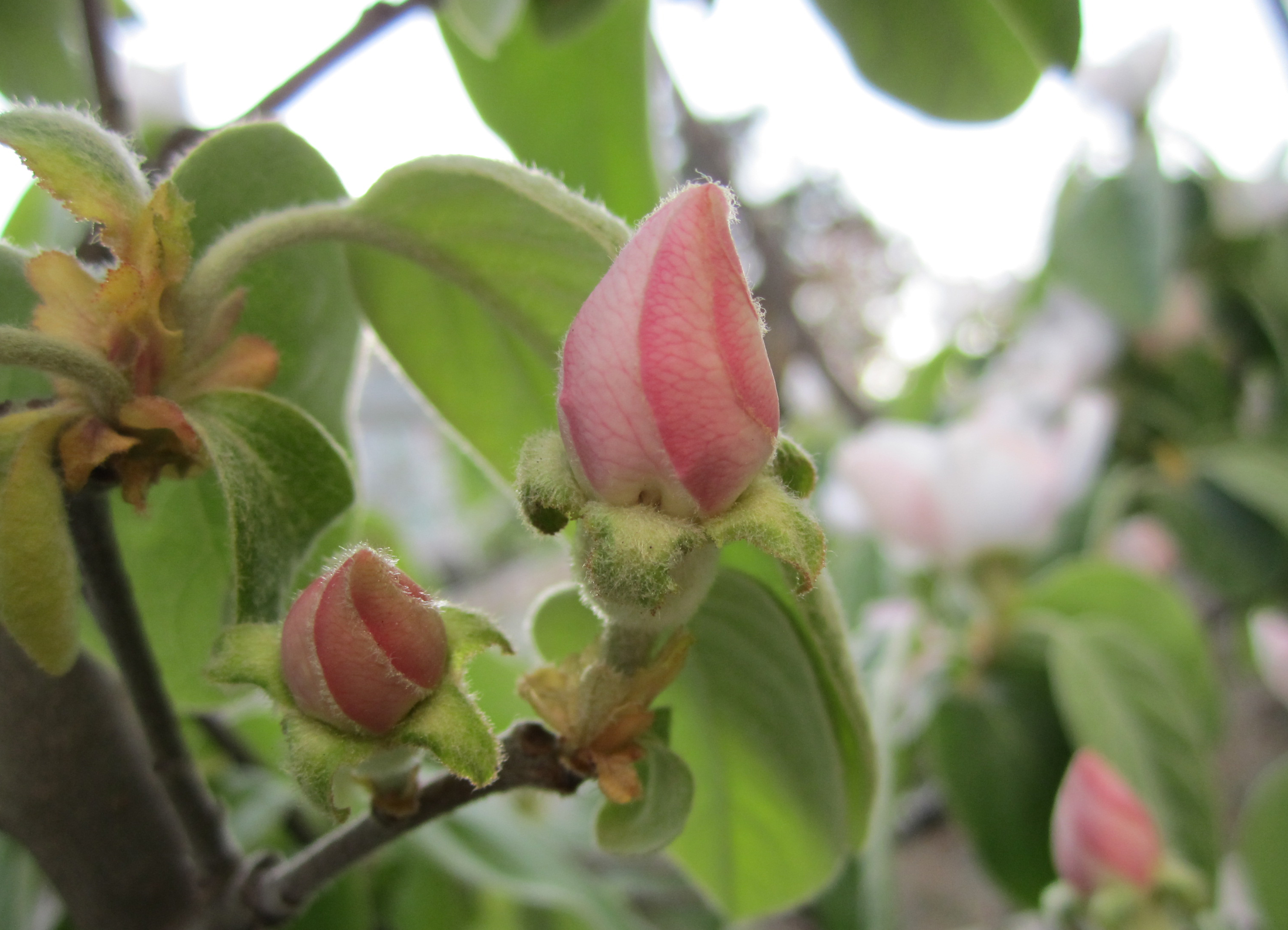 شکوفه به